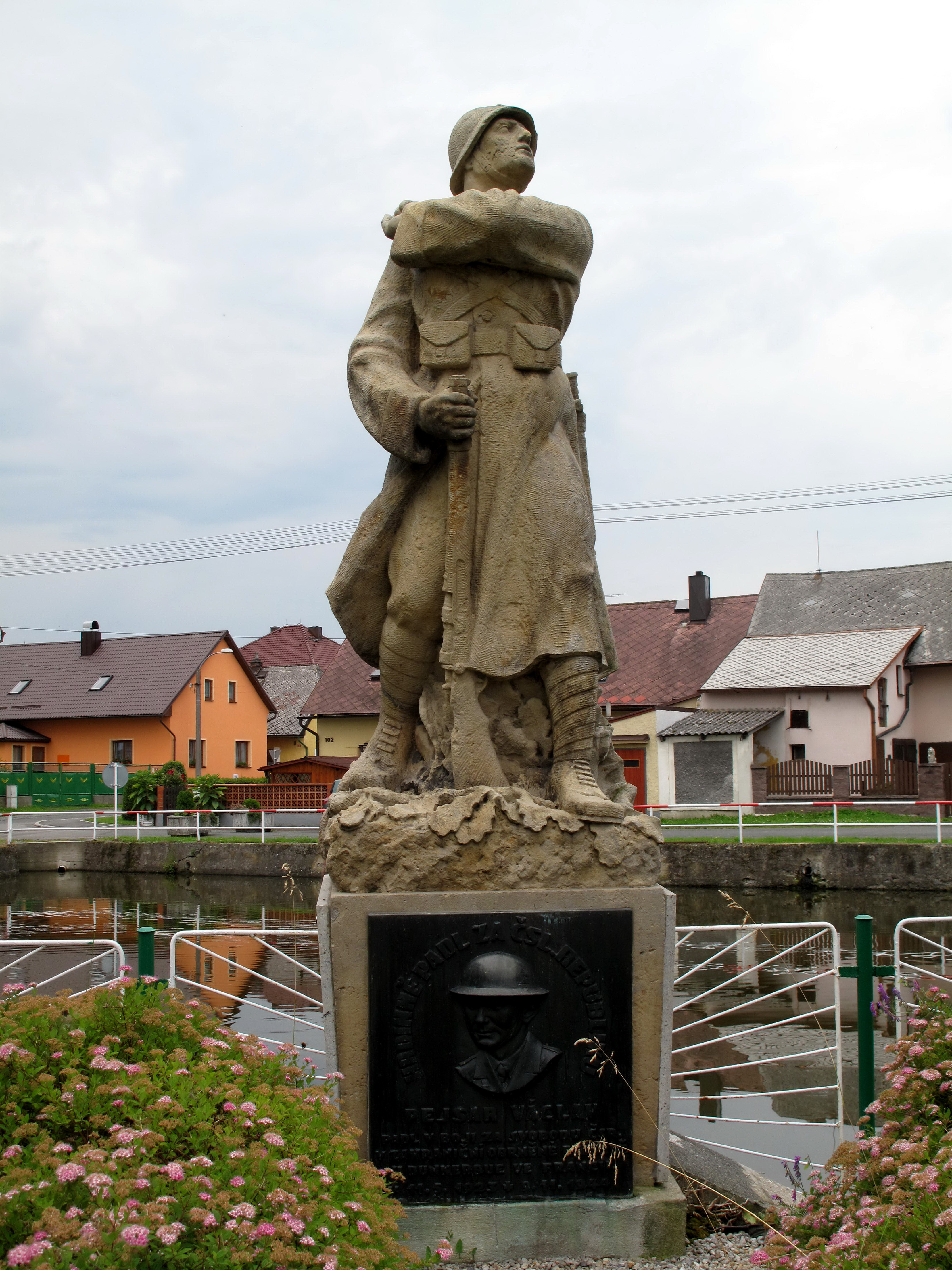 Tlumačov, socha vojáka